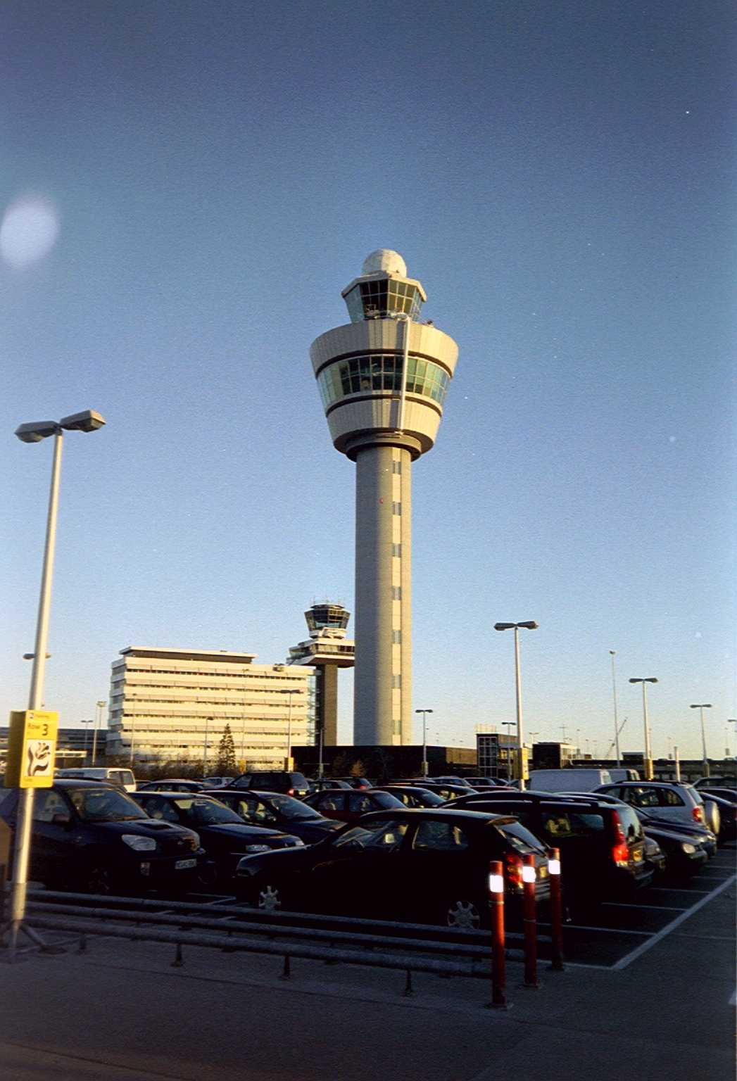 Huidige verkeerstoren op Schiphol en links daarvan zijn voorganger. Foto genomen op 7 dec. 2003